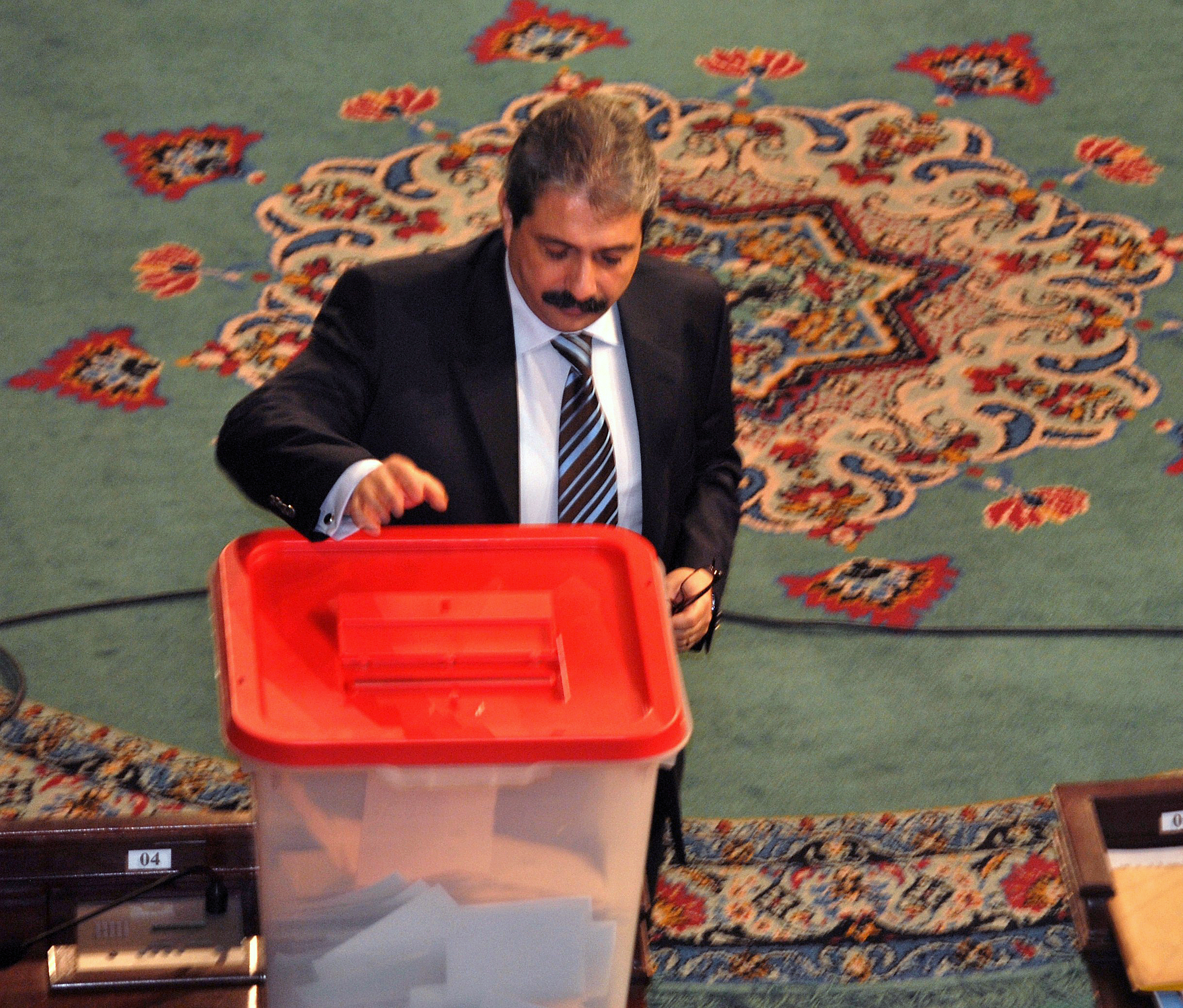 Dr Khalil Zaouia, ministre des Affaires sociales, lors du vote pour le président de l'assemblée constituante